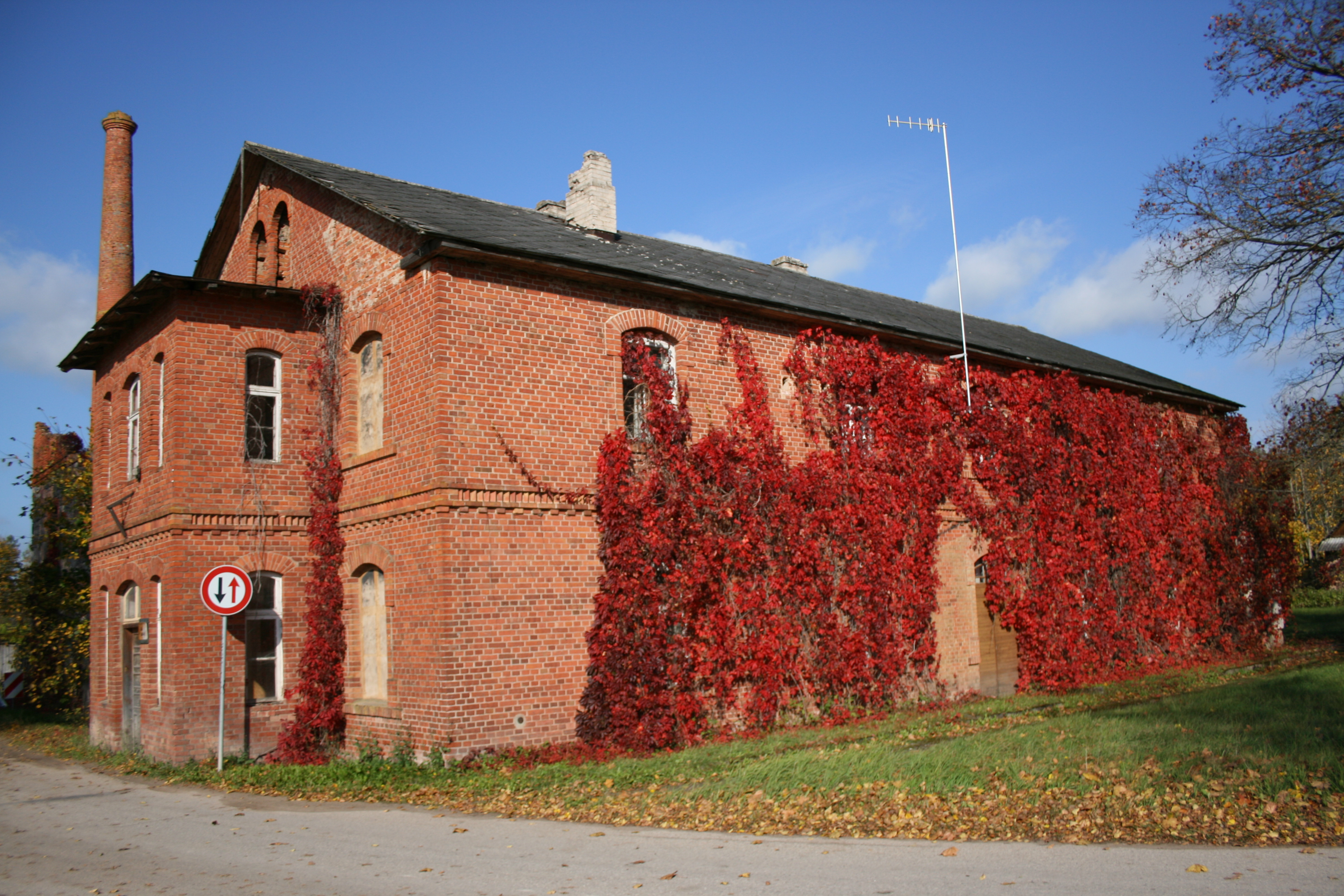 Vidagas dzirnavas rudenī